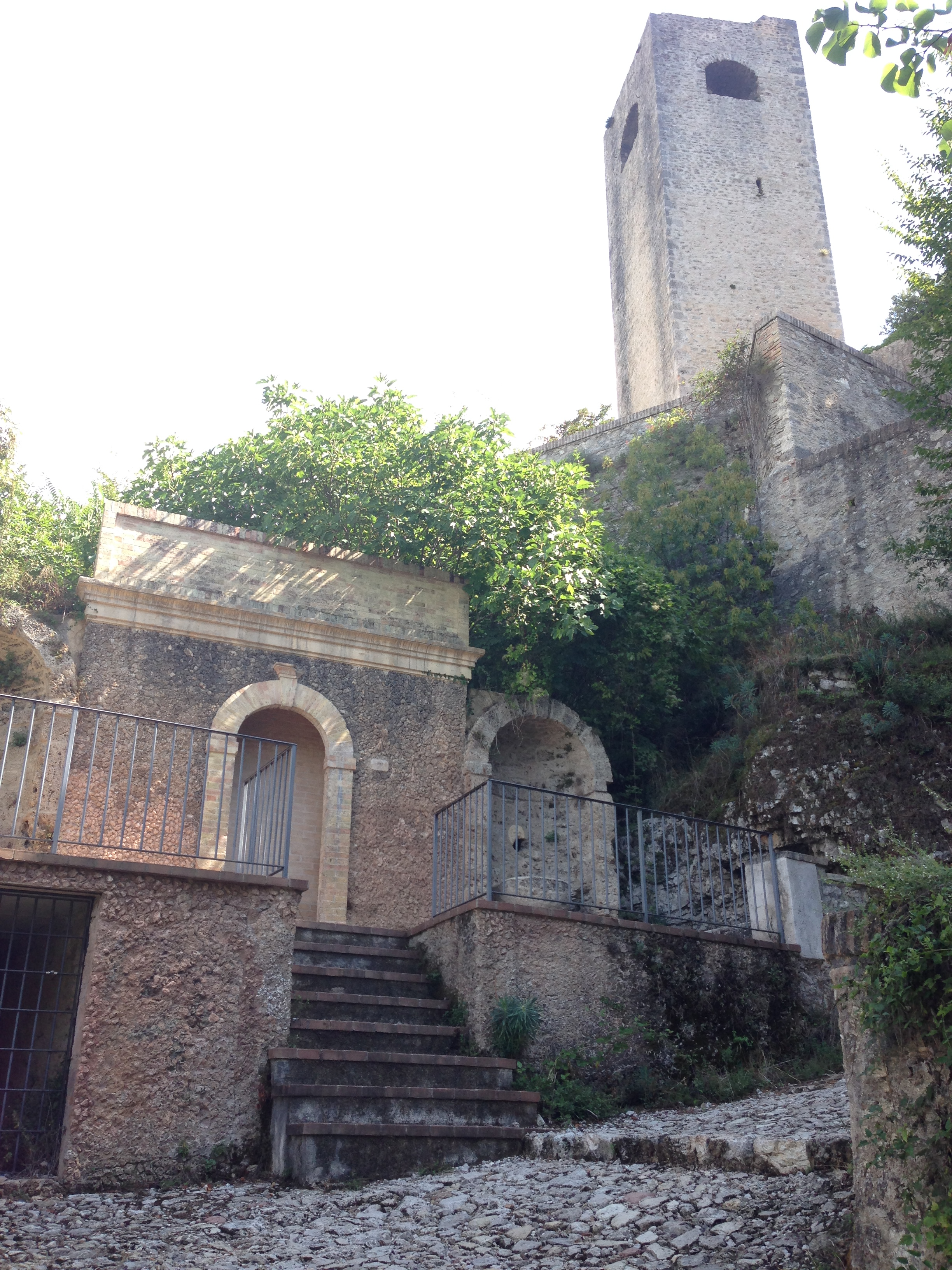 Fortilizio dei mulini. Spoleto